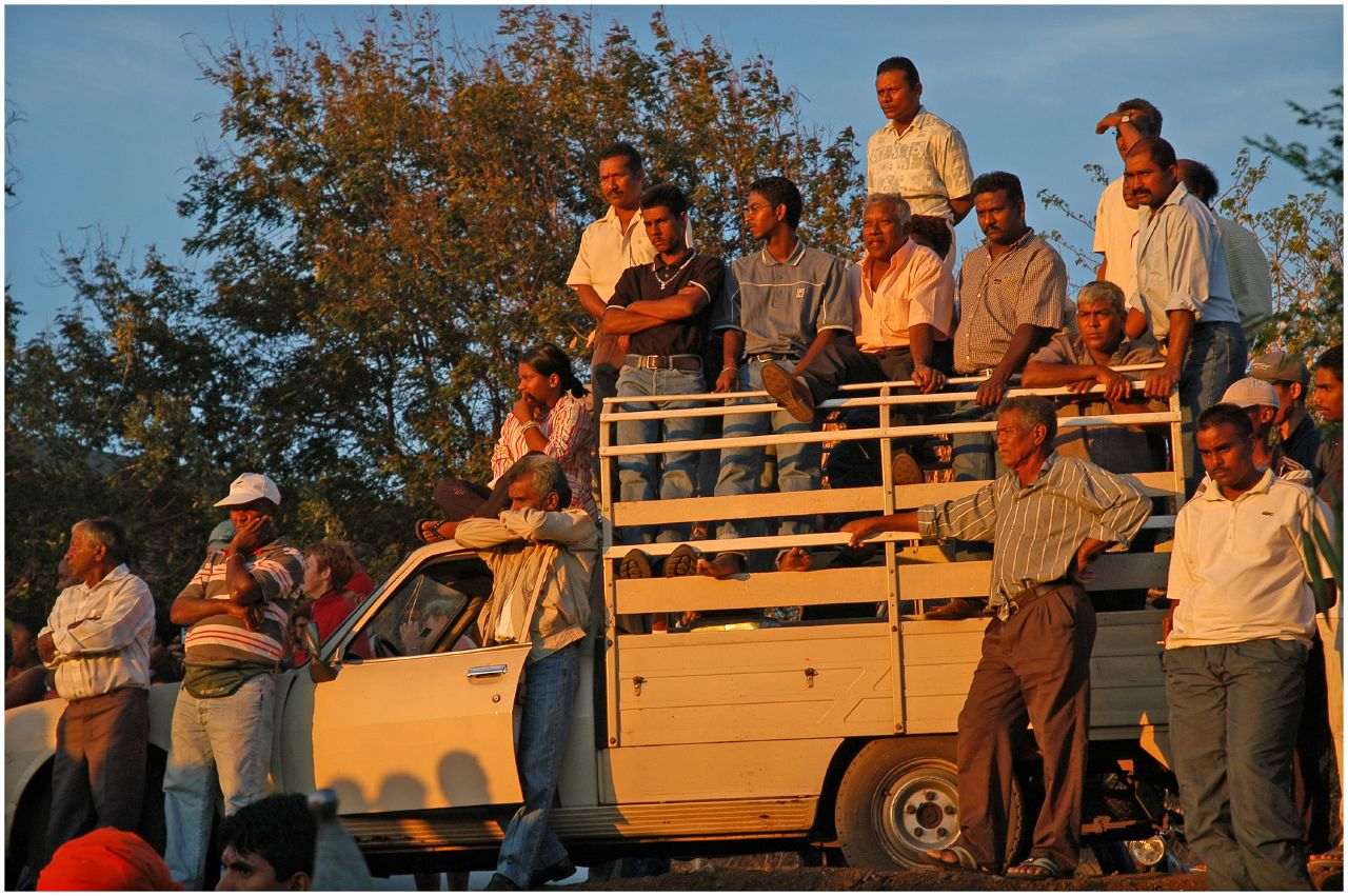 Le public lors d'une marche sur le feu sur l'île de La Réunion.